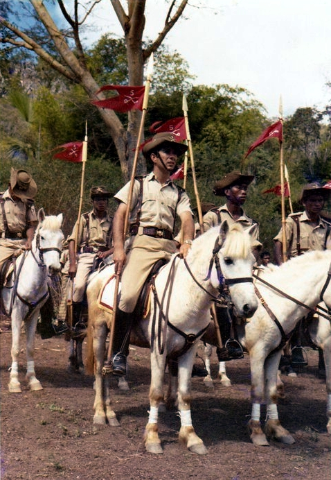 Huato Buicari--Cavaleiros do Esquadrão de Cavalaria 5 de Bobonaqro